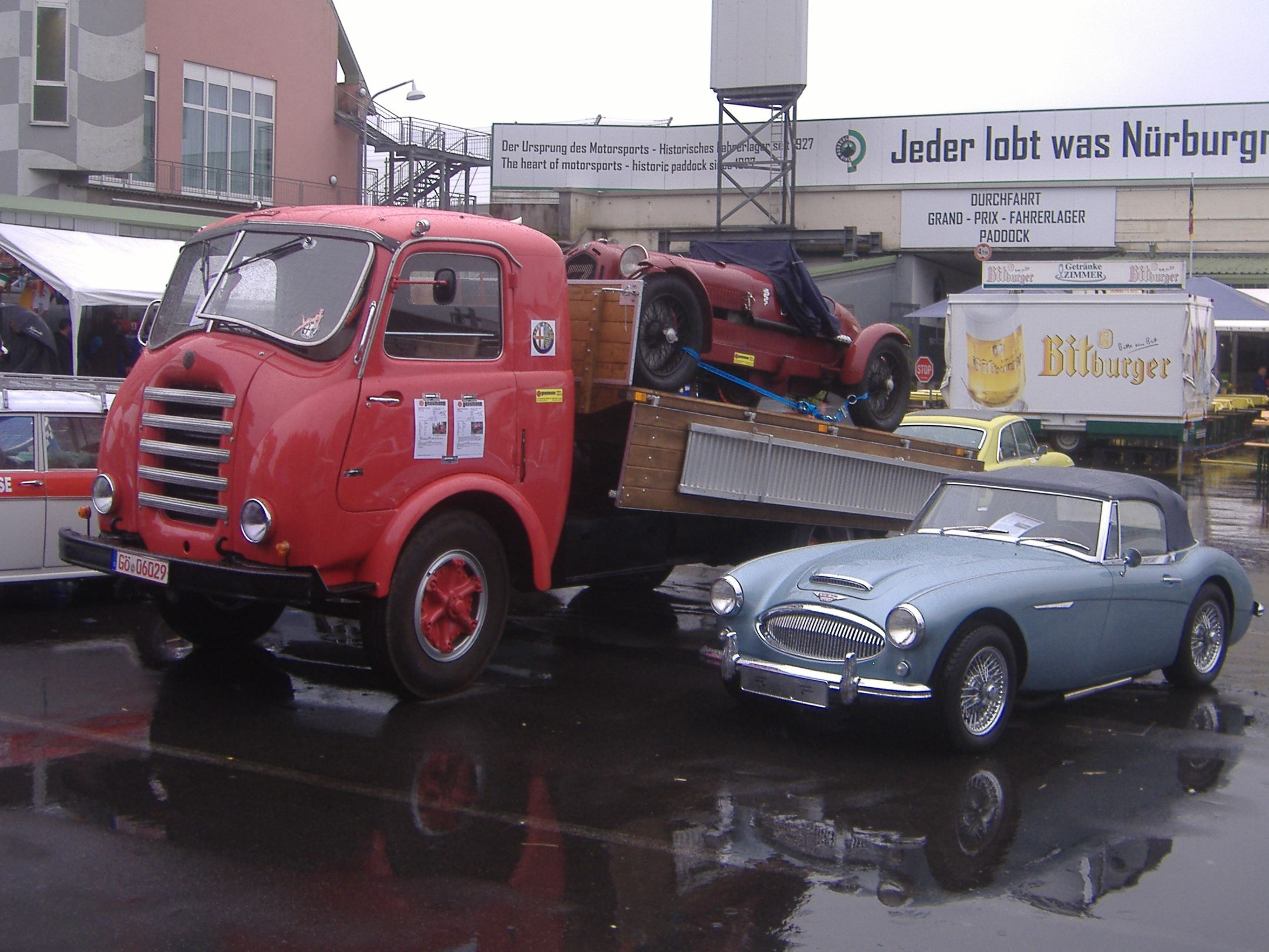 Alfa Romeo 455 Autotransporter LKW AVD Oldtimer Grand Prix 2014 - fotographiert im alten Fahrerlager des Nürburgrings Fahrzeugdaten lt. Aushang im Fahrzeug: Erstzulassung: 01.11.1955 Motorisierung: 62KW / 85PS 6,3L Dieselmotor